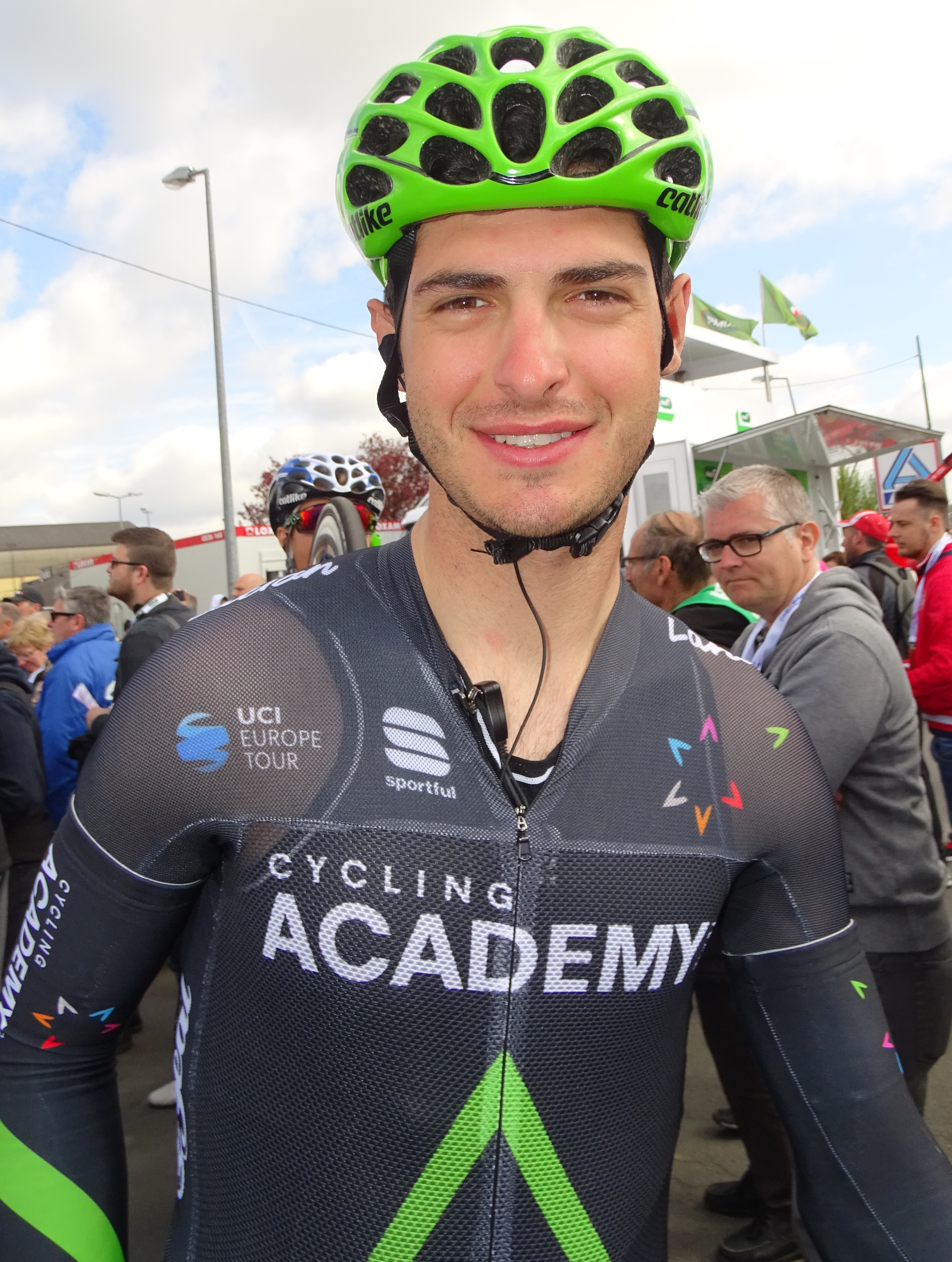 Reportage réalisé le jeudi 13 avril à l'occasion du départ et de l'arrivée du Grand Prix de Denain 2017 à Denain, Nord, Nord-Pas-de-Calais-Picardie, France.